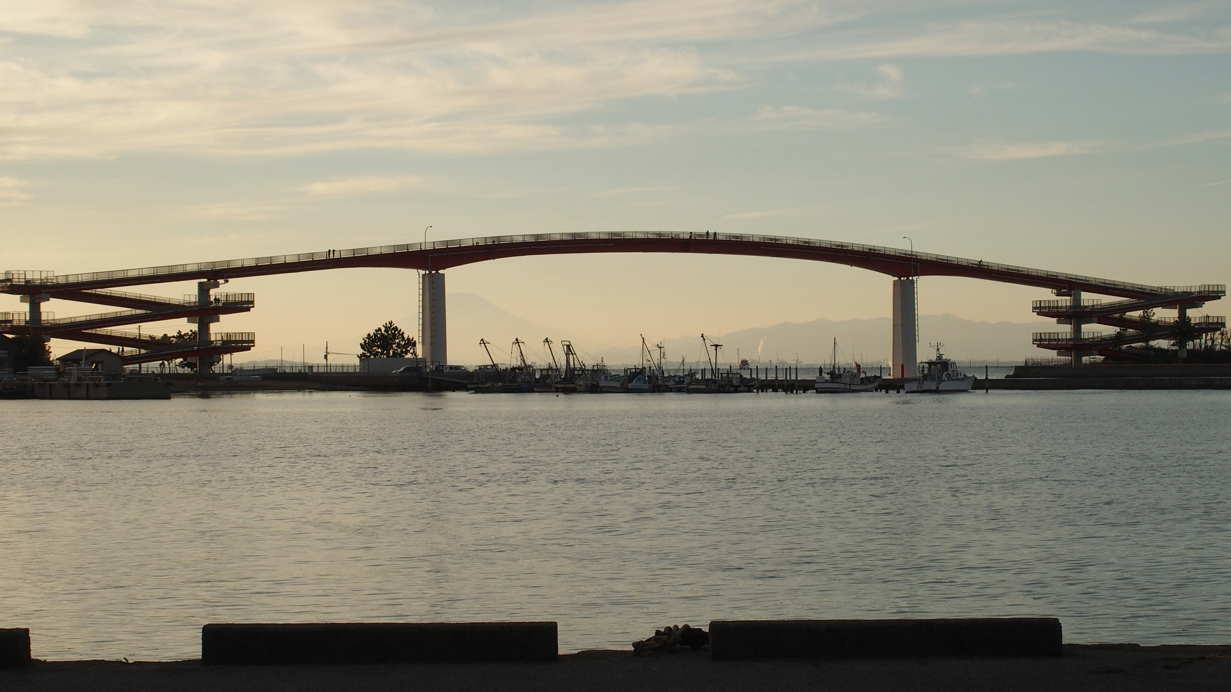 『中の島大橋』は木更津港に架けられた真紅の橋であり、日本で一番大きな歩道橋である。 木更津港内湾側から中の島大橋を撮影。方角先には富士山が見える